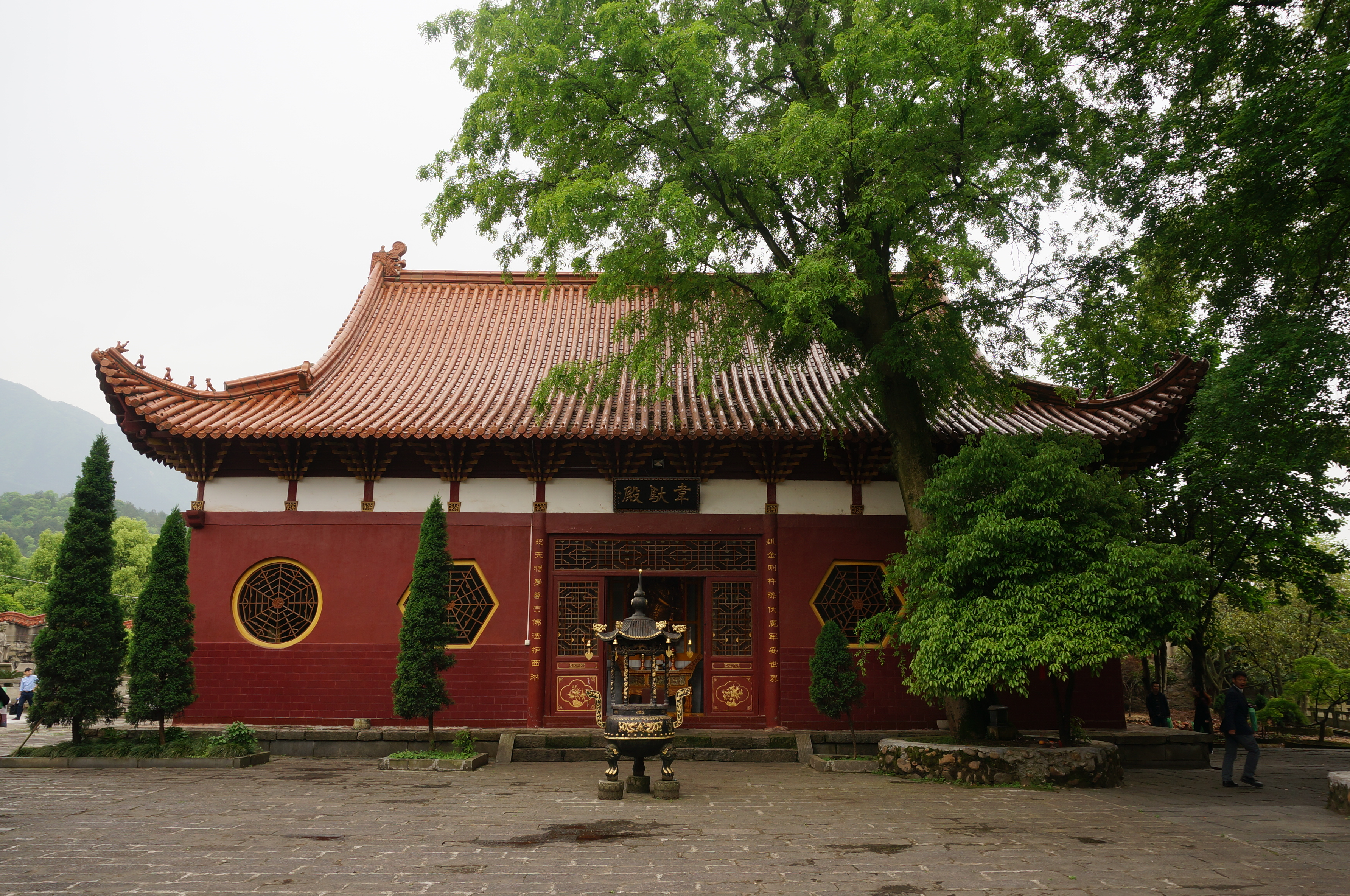 庐山西林寺，天王殿，北面。